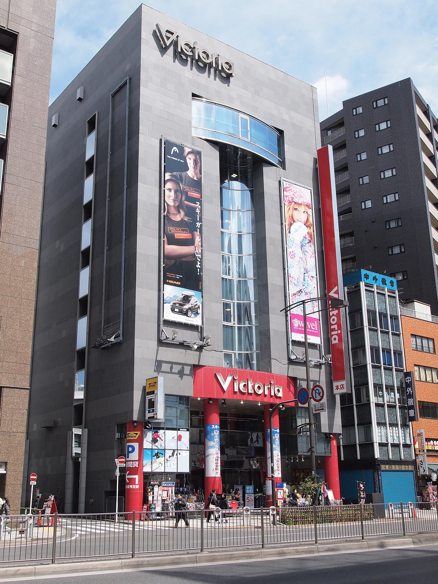 神田小川町にあるヴィクトリア本店外観。